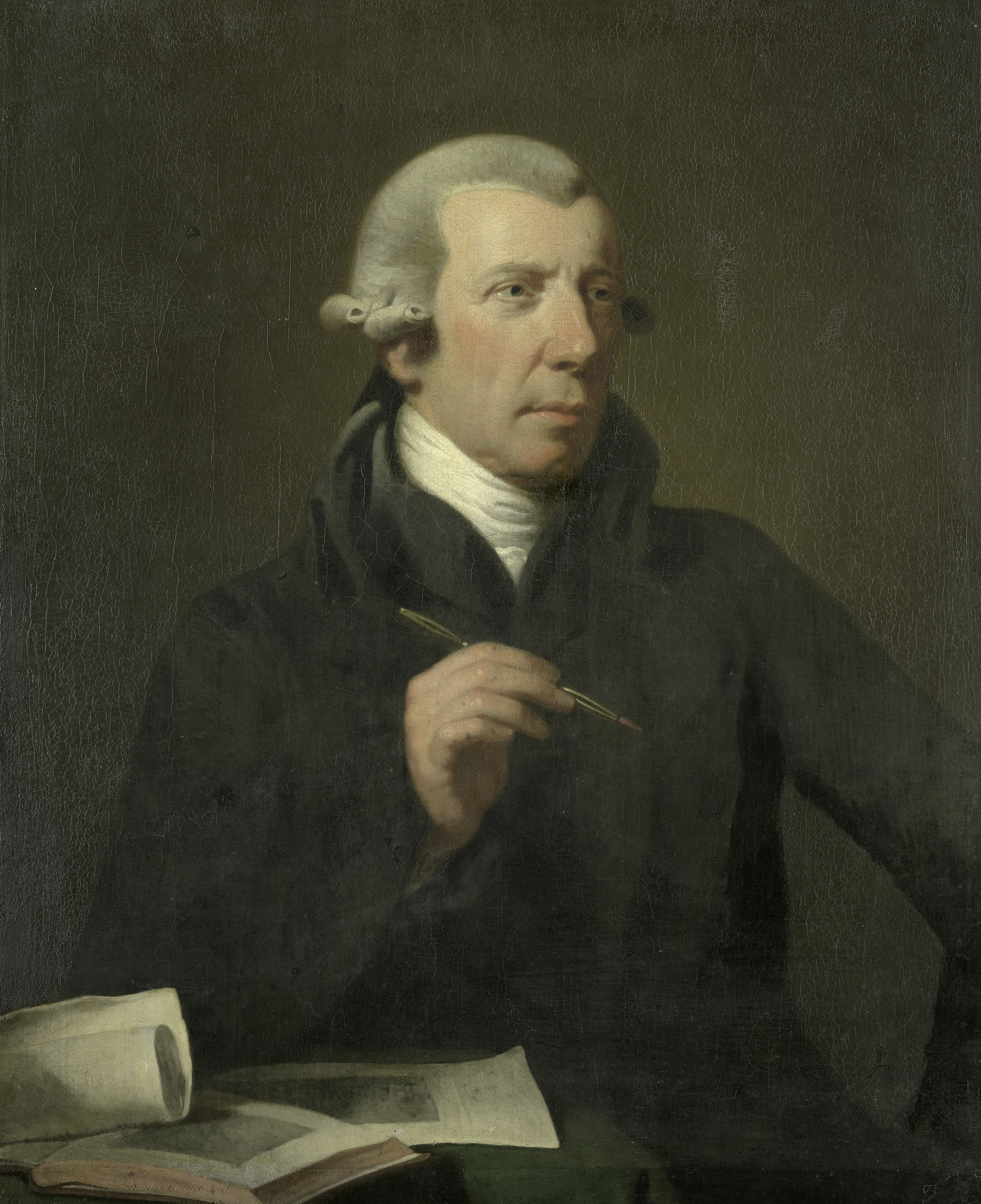 Portret van Reinier Vinkeles, tekenaar en plaatsnijder. Borstbeeld, zittend aan een tafel waarop een schetsboek of prentenboek een opgerolde blad papier en een tekening of prent. In de rechterhand een koperen tekenpen of graveerstift.